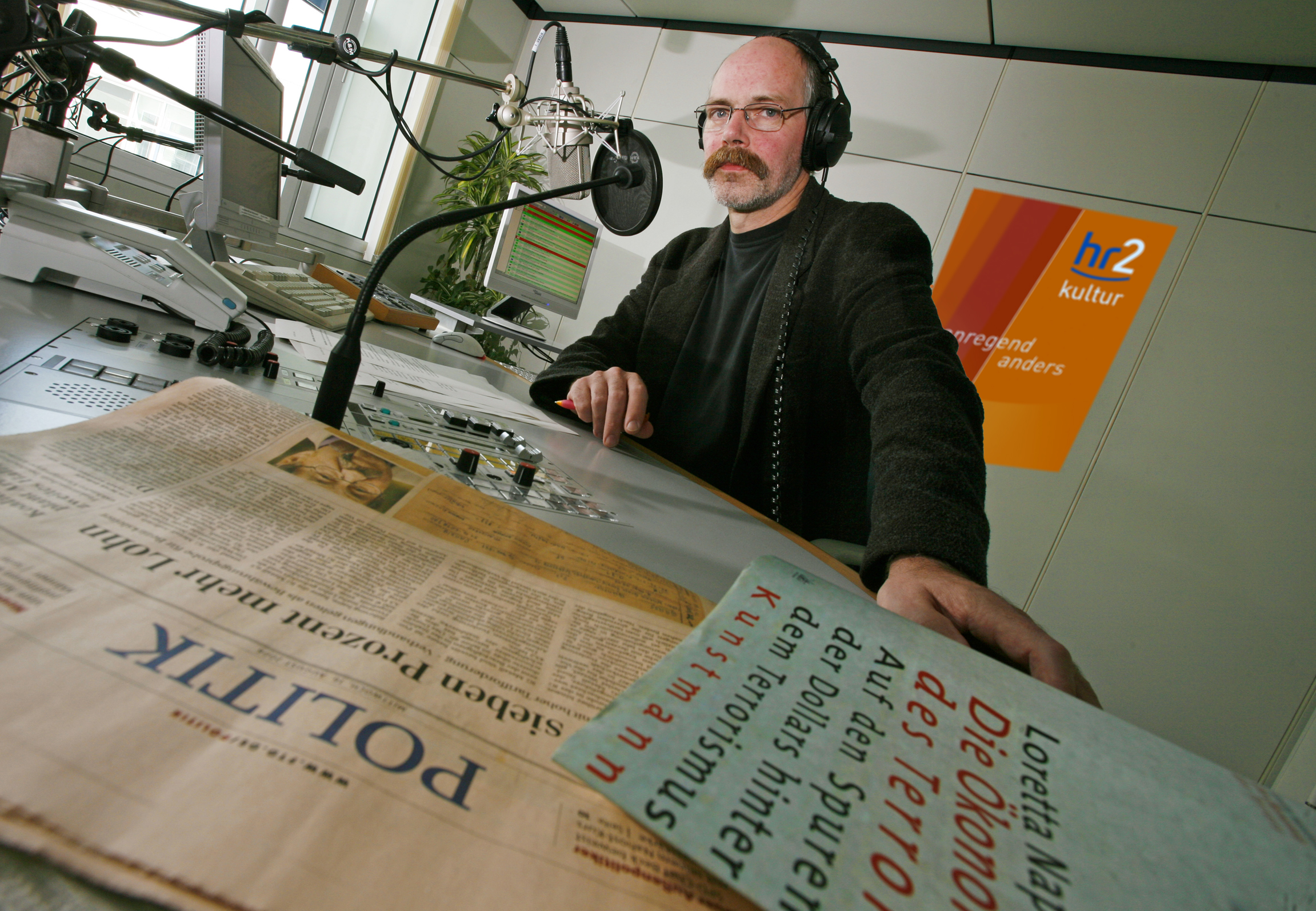 hr2-Moderator Florian Schwinn im Studio Fotograf: HR/Sascha Rheker freigegeben durch HR/Pressestelle 069/155 -2583, Fax -2126